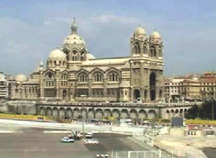 D'Cathedral vu Marseille.